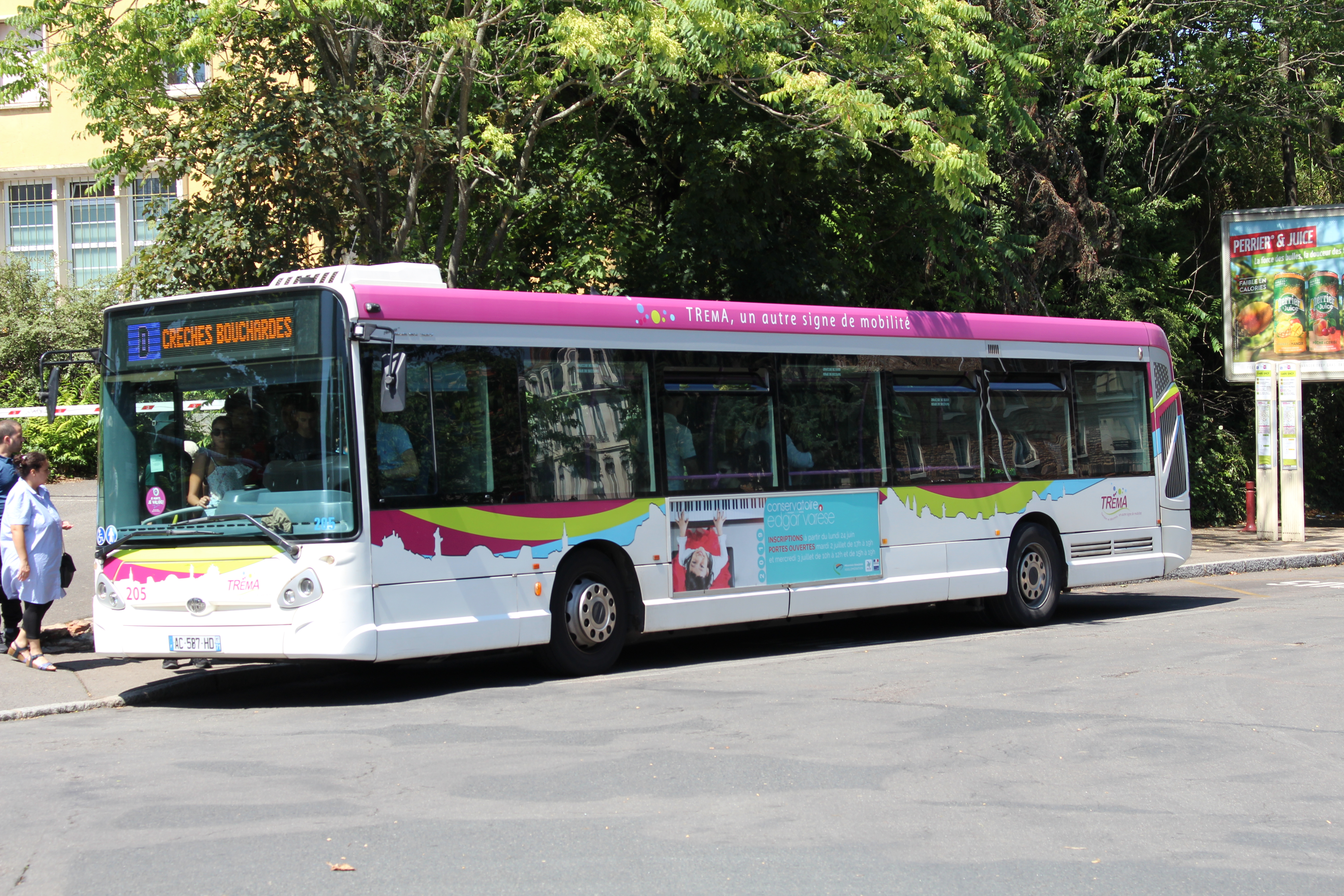 Bus de la ligne D du réseau Tréma à la gare de Mâcon-Ville, 6 juillet 2019.